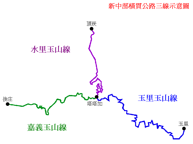 新中部橫貫公路三線示意圖。